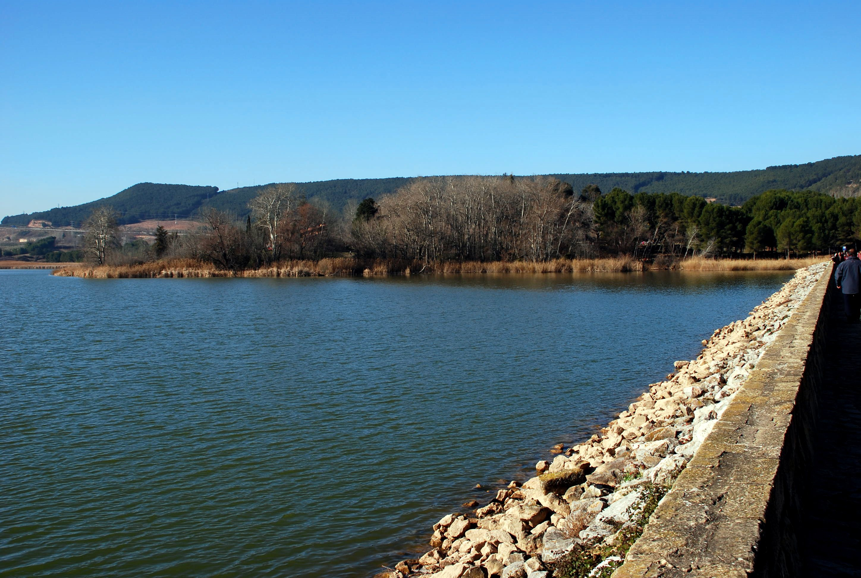 Presa de embalse de La Grajera en Logroño (La Rioja).